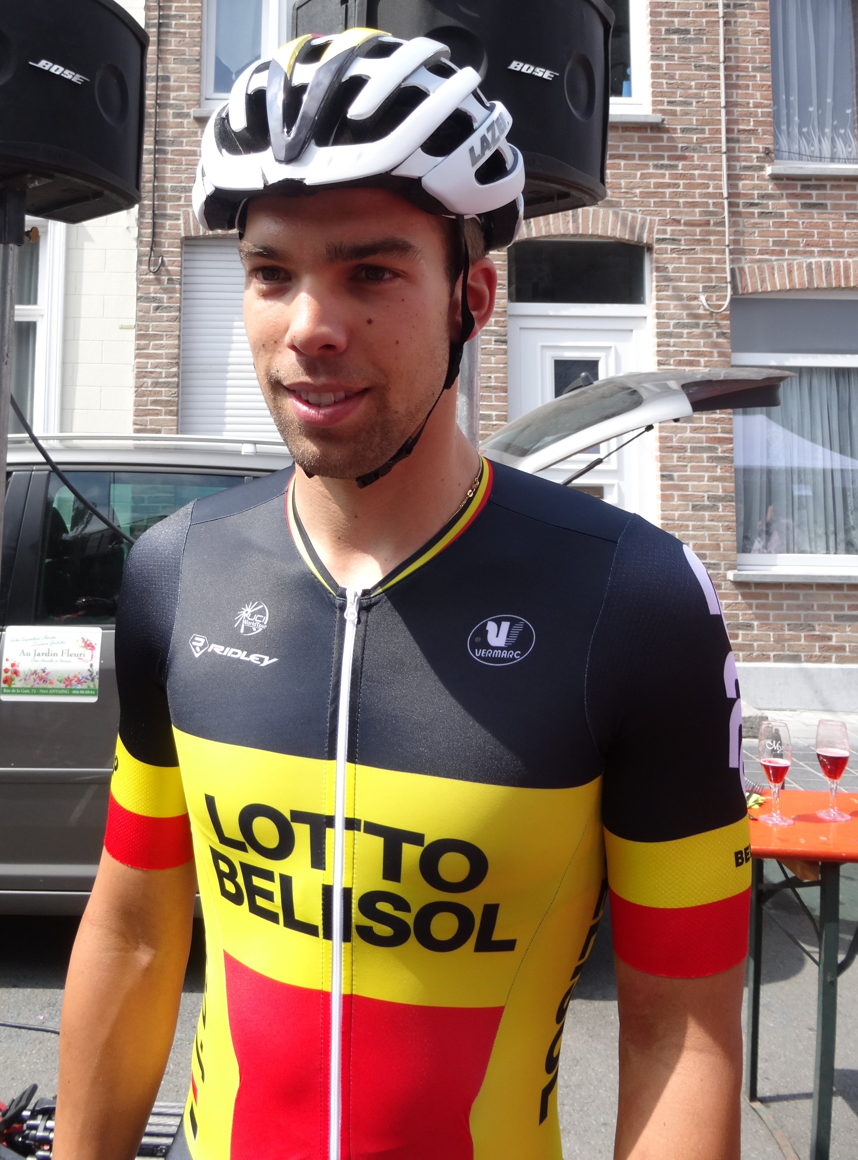 Reportage photographique réalisé le samedi 26 juillet à l'occasion du départ de la première étape du Tour de Wallonie 2014 à Frasnes-lez-Anvaing, Belgique.